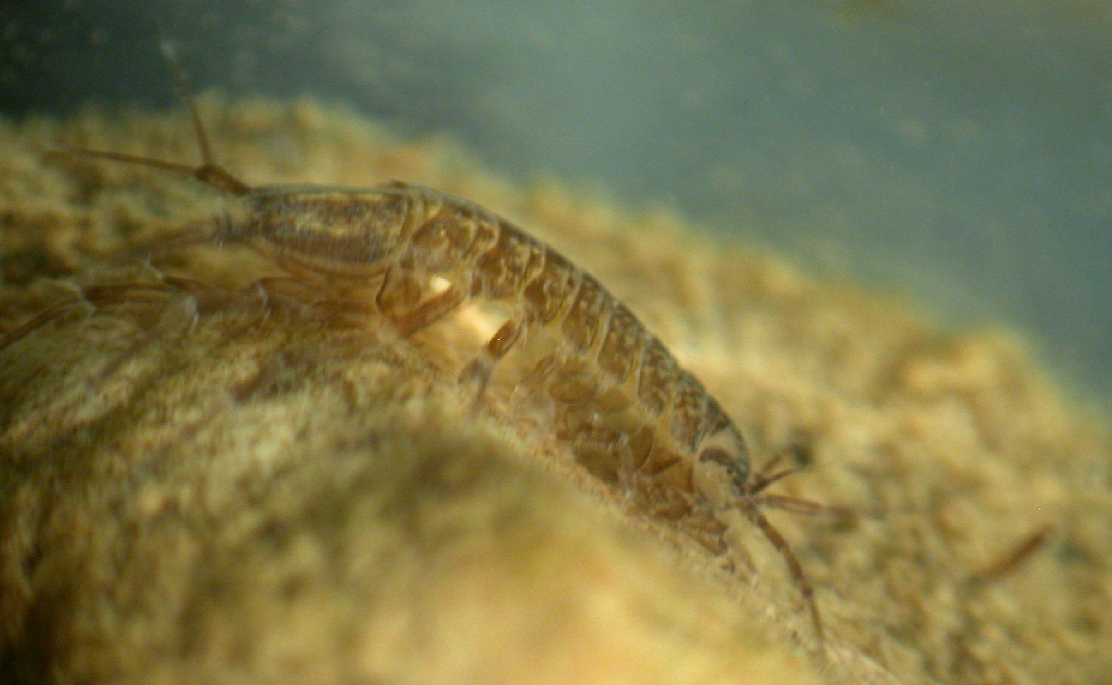 Ūdens ēzelītis (Asellus aquaticus). Ķengaraga dīķis.